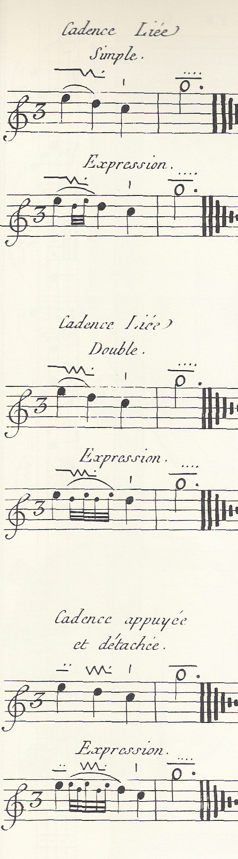 Planche n° CVI